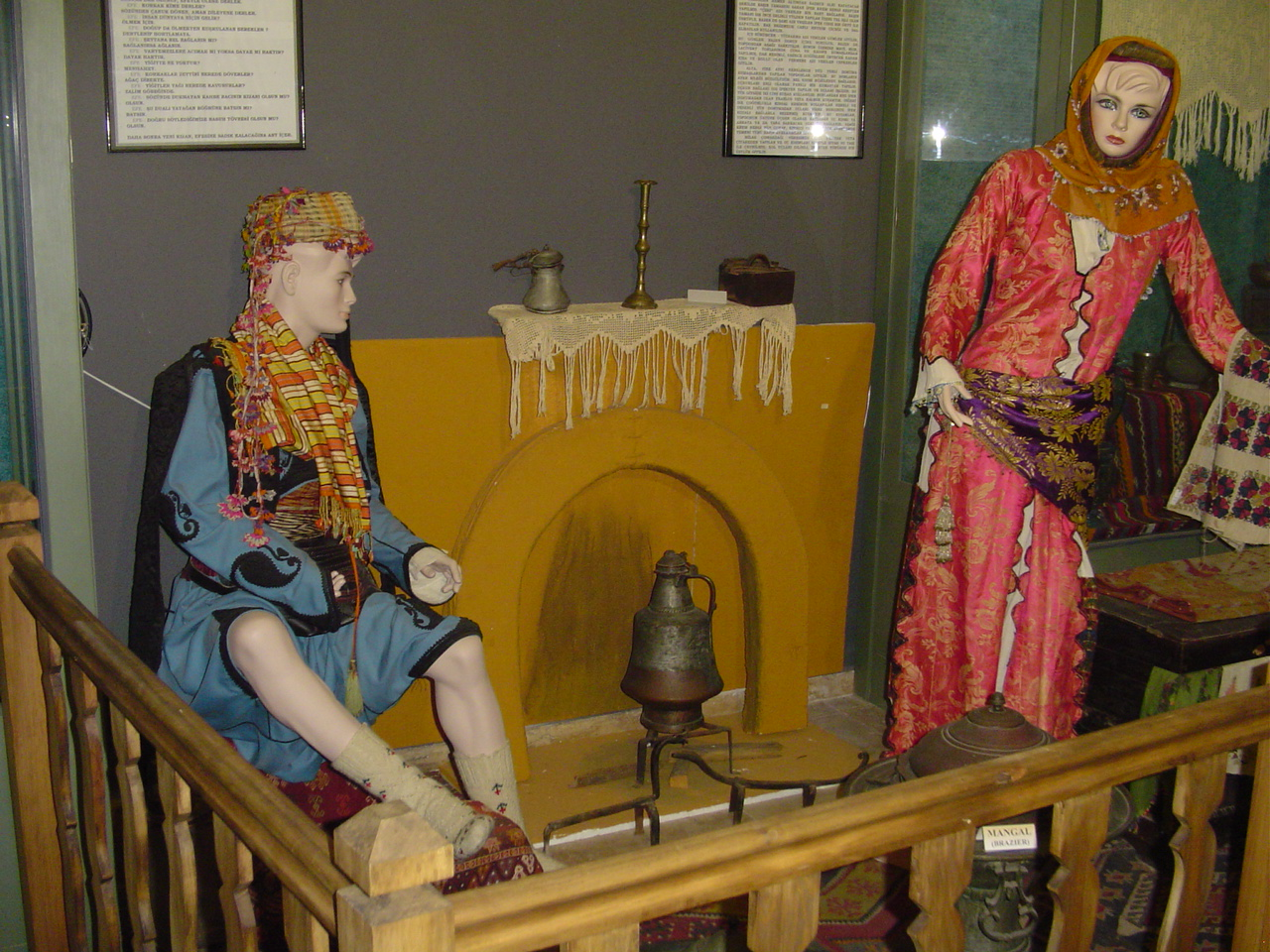 Musée de Muğla